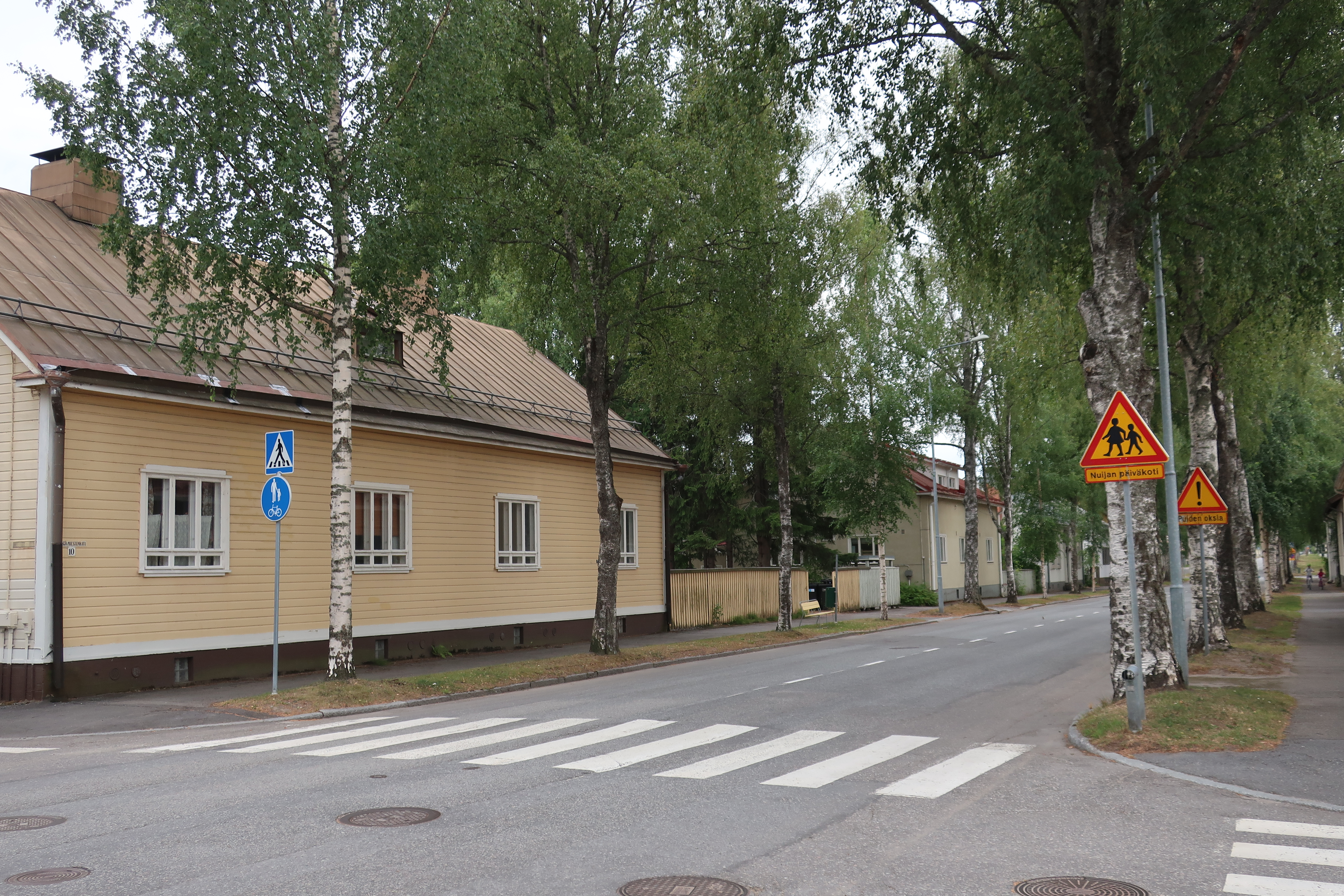 Nuijamiestenkatu Mikkelin Nuijamiehen kaupunginosassa.